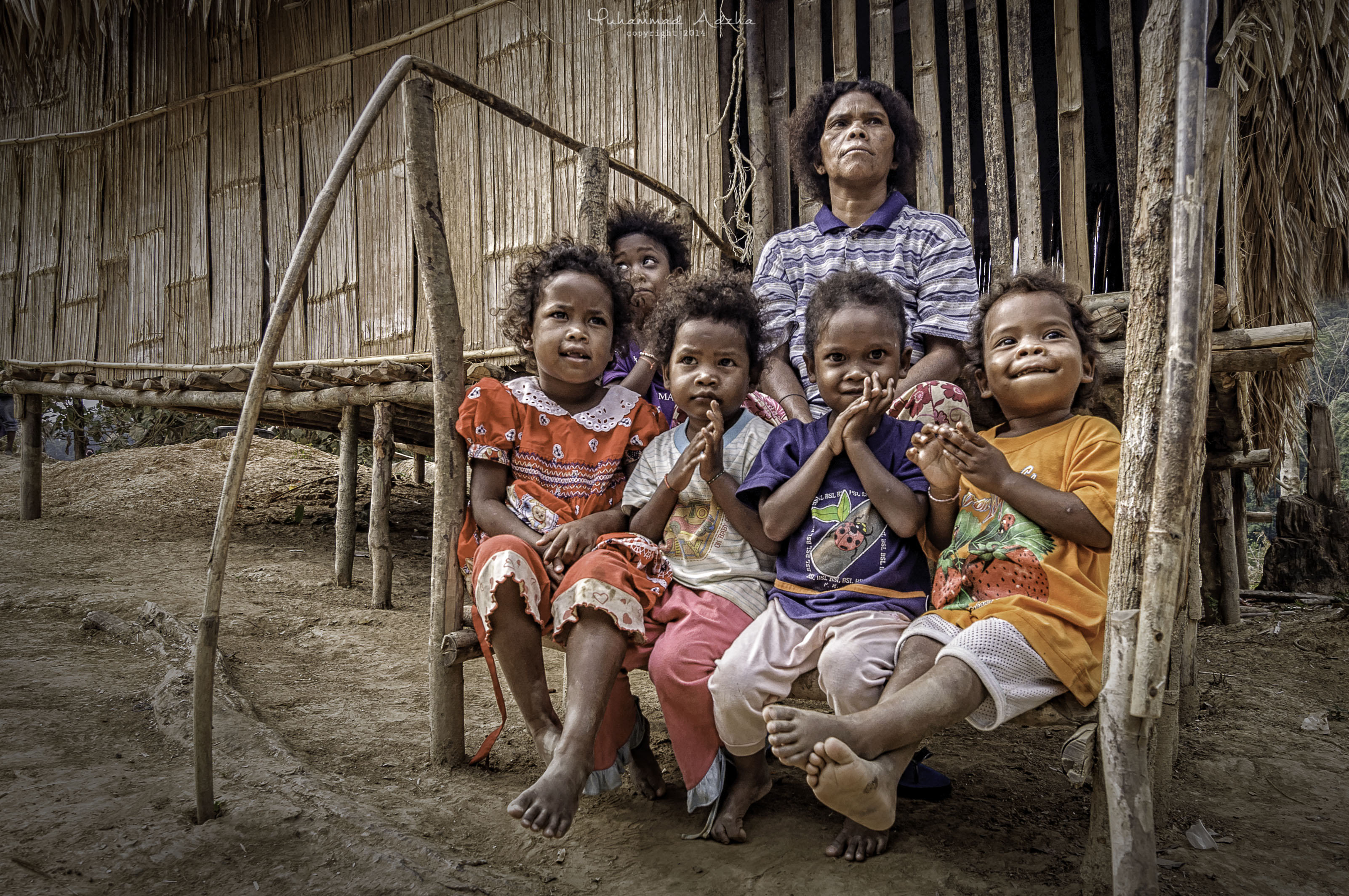 masyarakat orang asli di Royal Belum